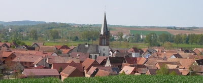 Photo de la commune d'Ingenheim, Bas Rhin, France